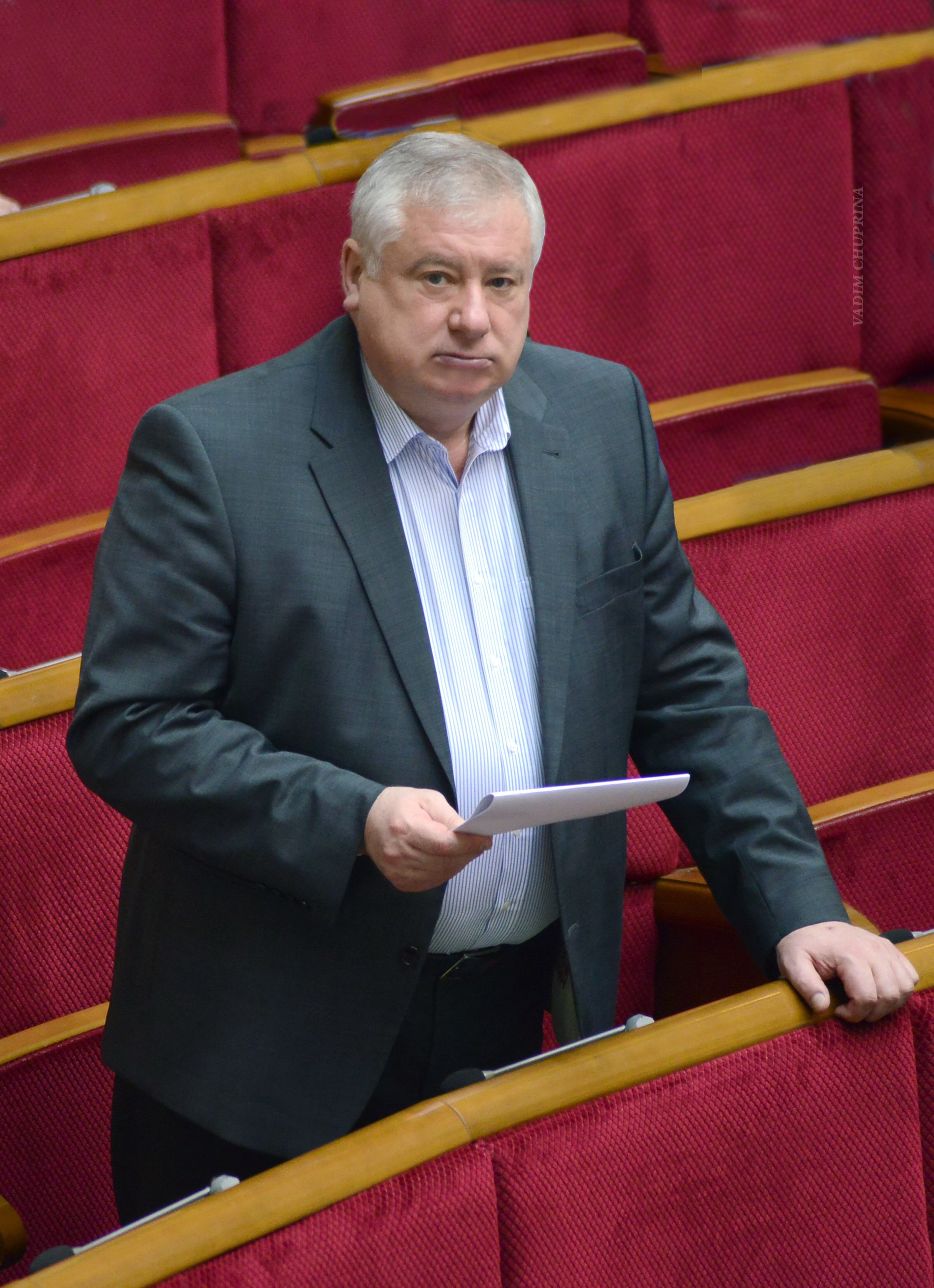 ВЕРХОВНА РАДА УКРАЇНИ 2016 , фото Вадим Чуприна